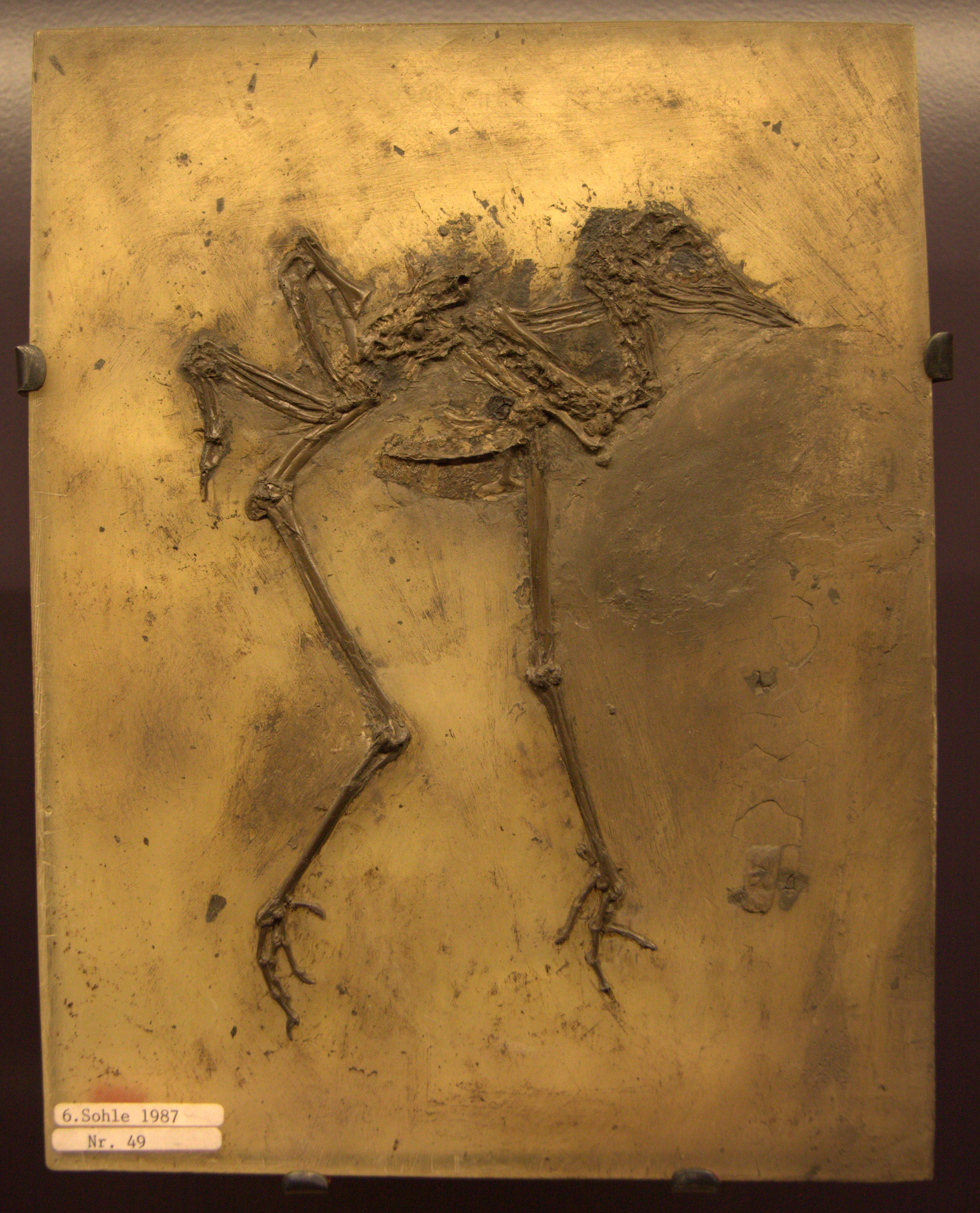 Fossile d'oiseau terrestre rapproché de la grue. The making of this document was supported by Wikimédia France. (Submit your project!)